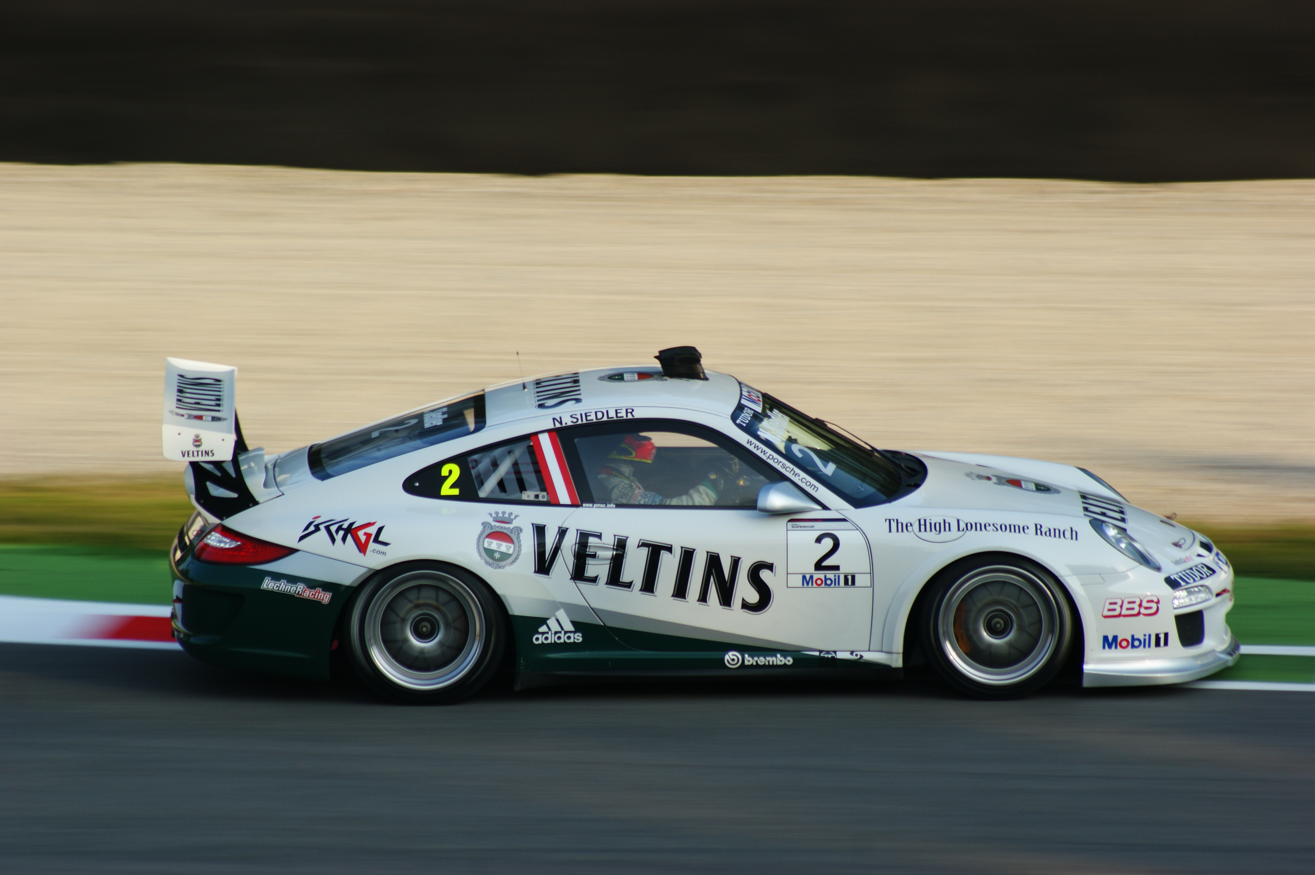 Norbert Siedler alla variante Ascari Monza 2011